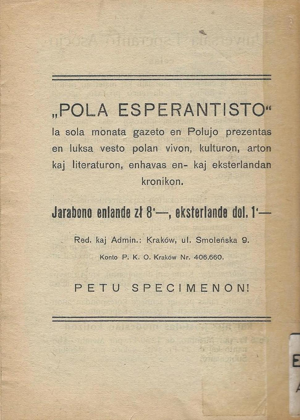 kovrilo de libro "Dibuk", 1927